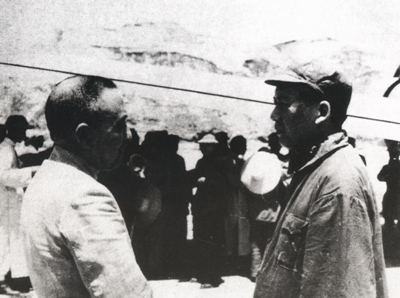 1945年7月1日，六参政员抵达延安。毛澤東與黃炎培在延安機場親切交談。毛澤東在青年時代曾經聽過黃炎培的演講，久別重逢，分外親切！